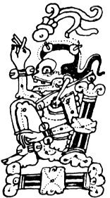 Ah Puch, from Dresden Codex